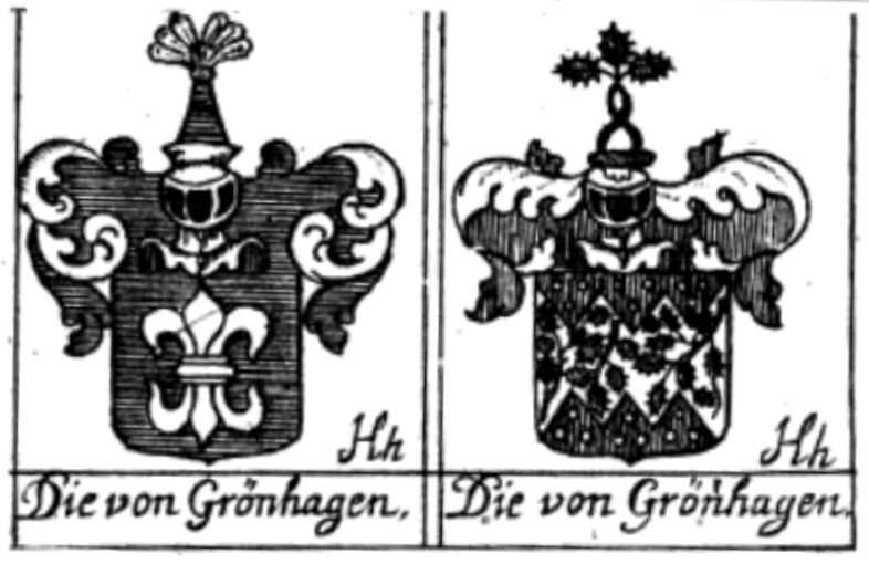 Wappen I (mit der Lilie) und II (mit dem Hagen) derer von Grönhagen/Grünhagen).